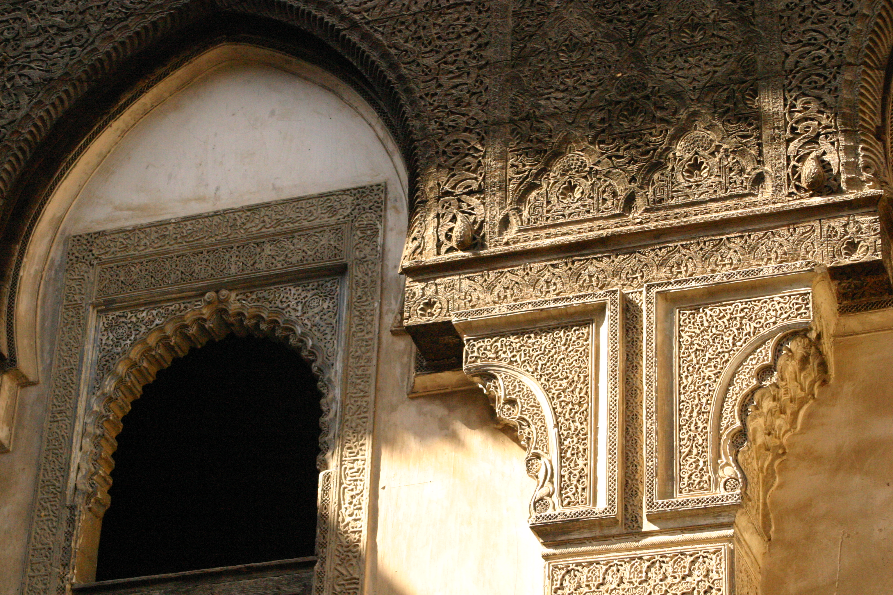 Madrasa as-Sahrij, Fes.